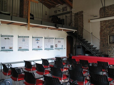 Centro di documentazione sulla cultura di Golasecca (ex-scuola di Pozzola), in località Beati a Castelletto sopra Ticino (NO), Italia.